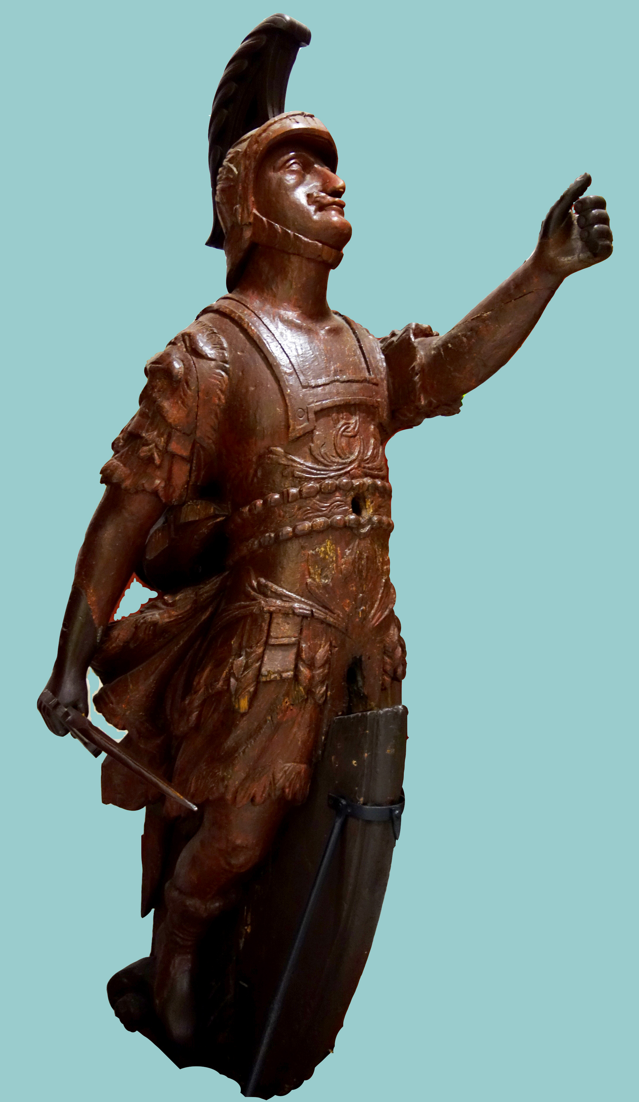 Η κορβέτα Καρτερία υπήρξε το πρώτο πλοίο του ελληνικού εθνικού στόλου και το πρώτο ατμήλατο πλοίο παγκοσμίως που συμμετείχε σε πολεμικές επιχειρήσεις, με κυβερνήτη τον Άγγλο φιλέλληνα Frank Hastings.